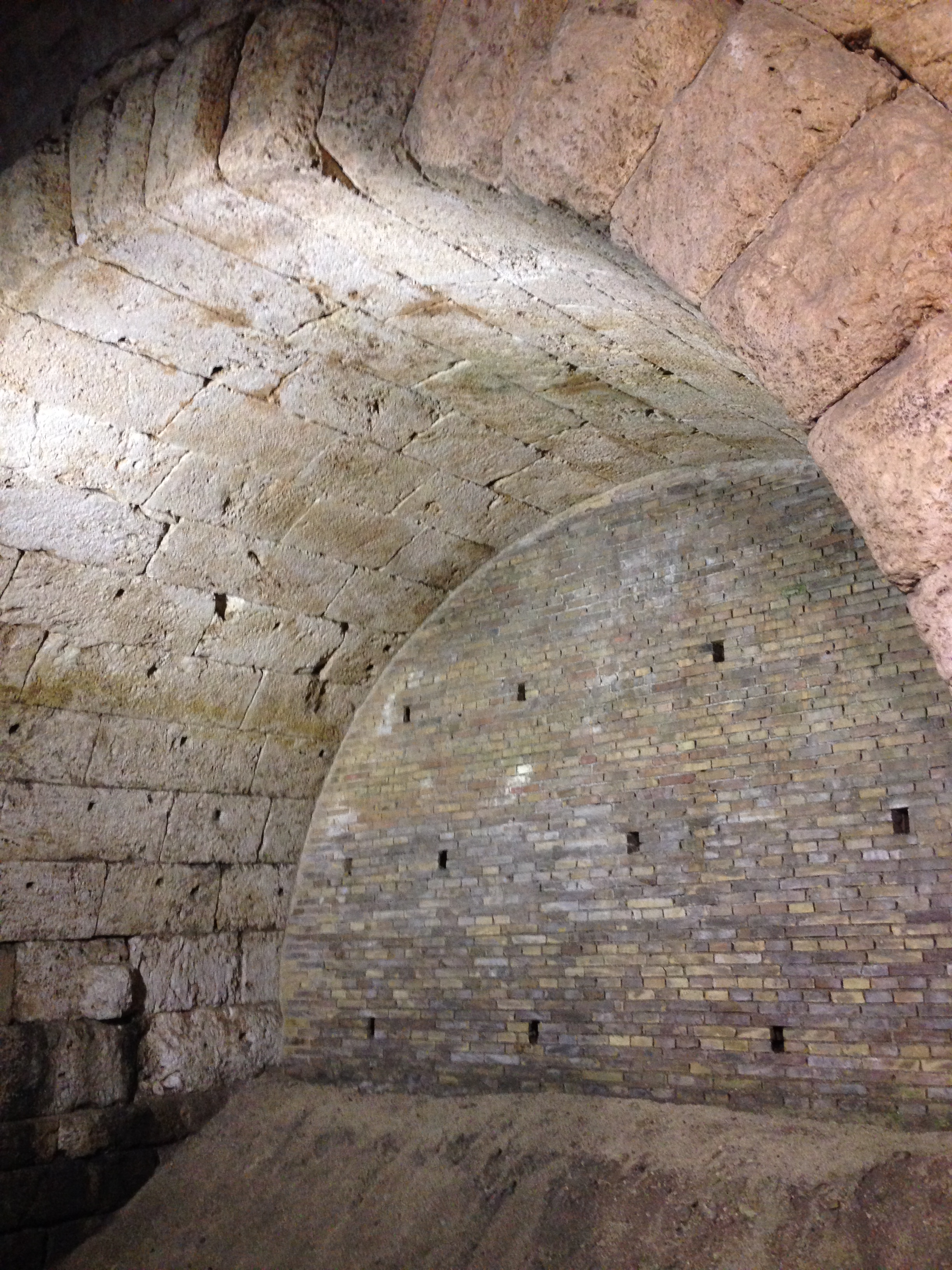 Spoleto, Ponte sanguinario. Arcata